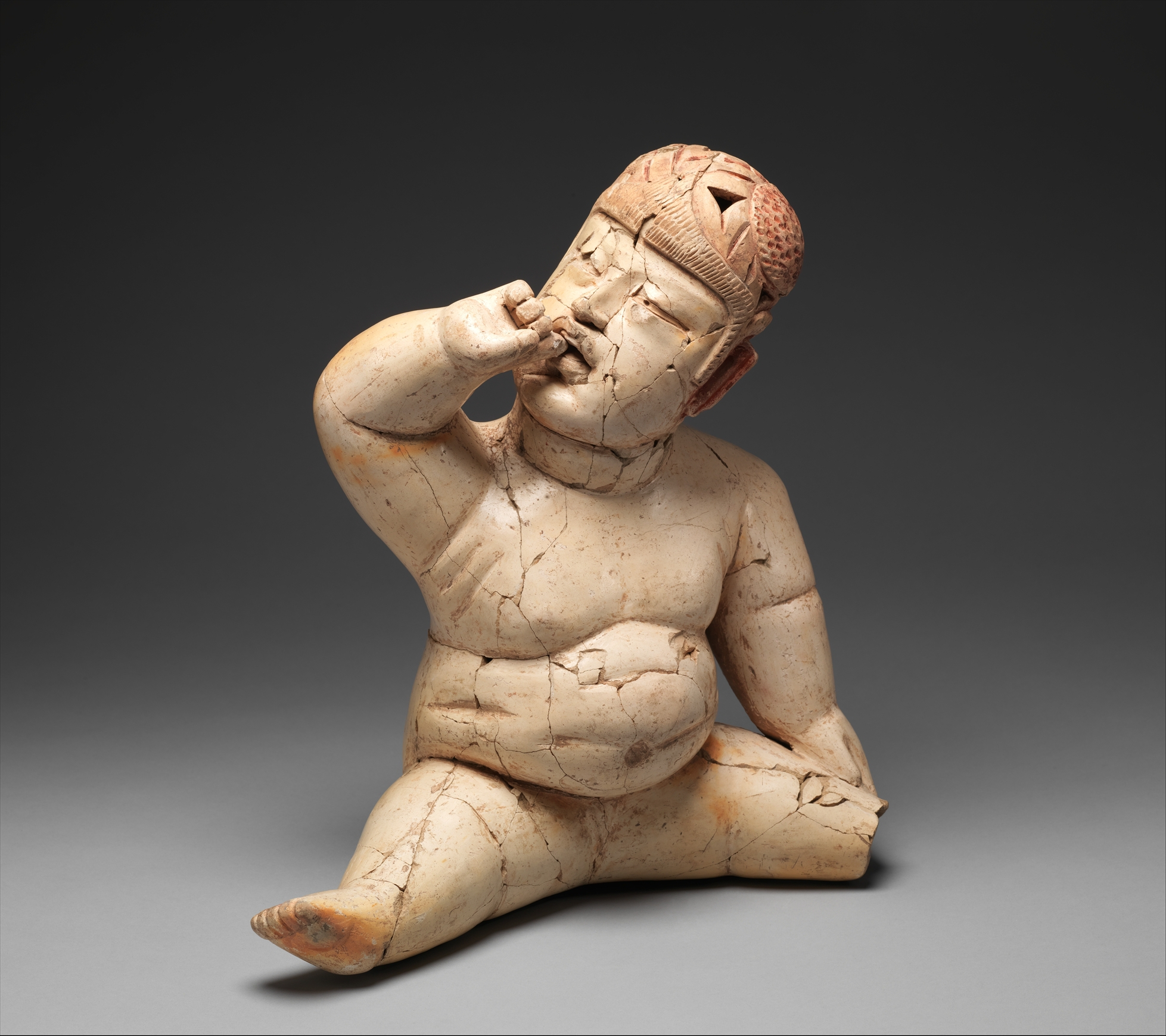 Olmec; Figure; Ceramics-Sculpture